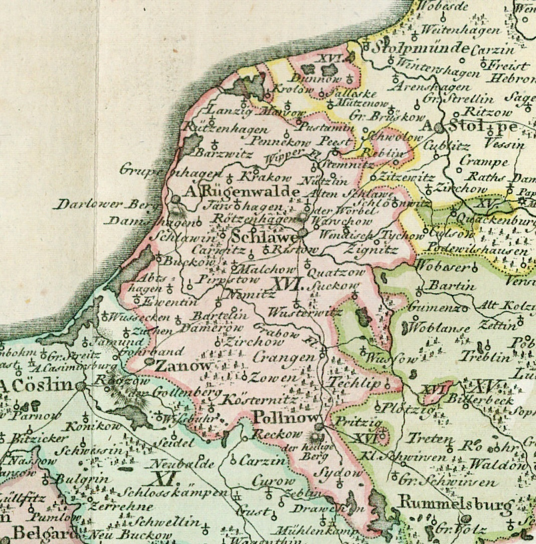 Ausschnitt aus "Landkarte des Herzogtums Vor- und Hinterpommern aus dem Jahr 1794